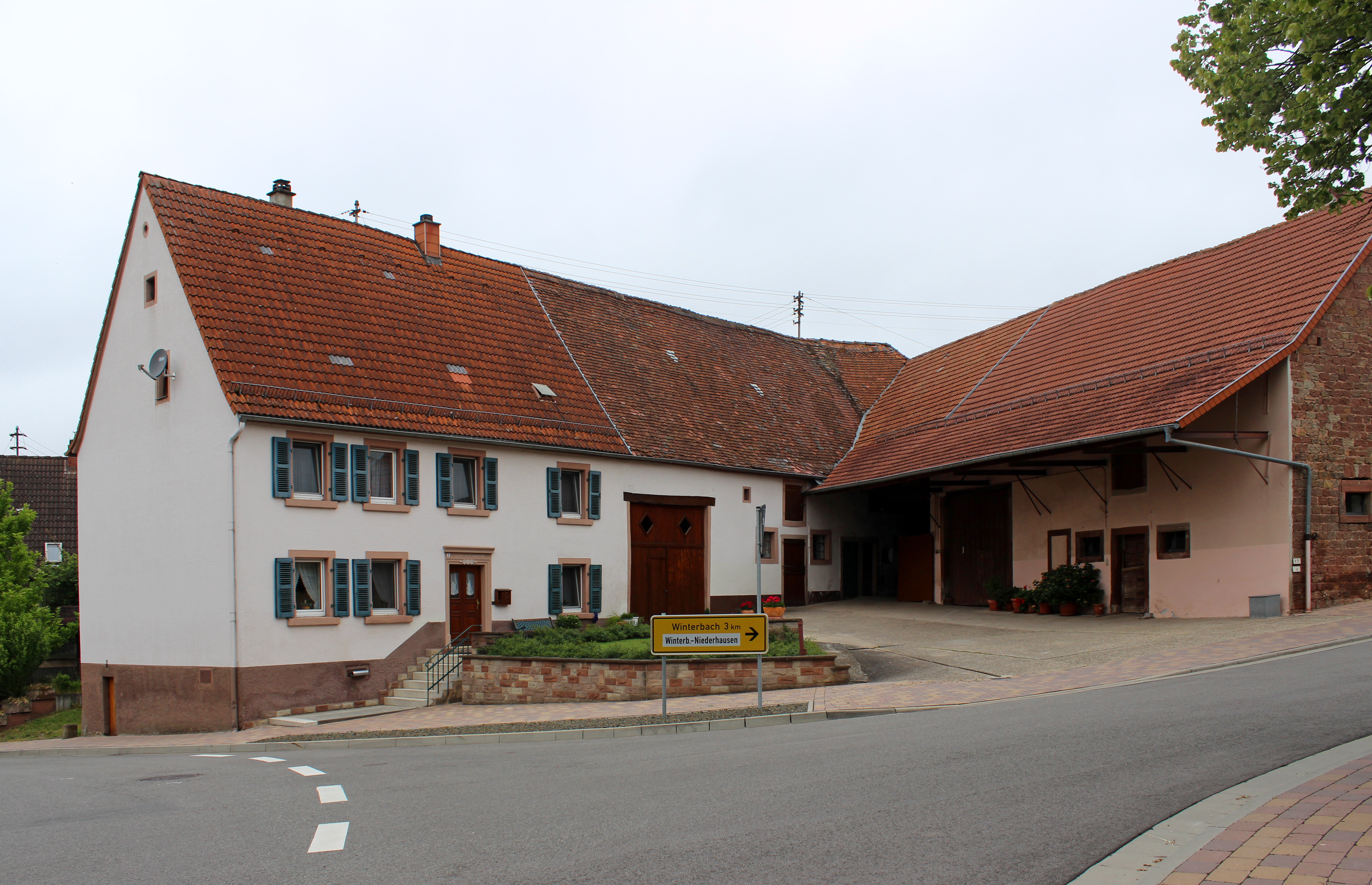 Denkmalgeschütztes Quereinhaus in Battweiler, Verbandsgemeinde Zweibrücken-Land, Landkreis Südwestpfalz, Rheinland-Pfalz